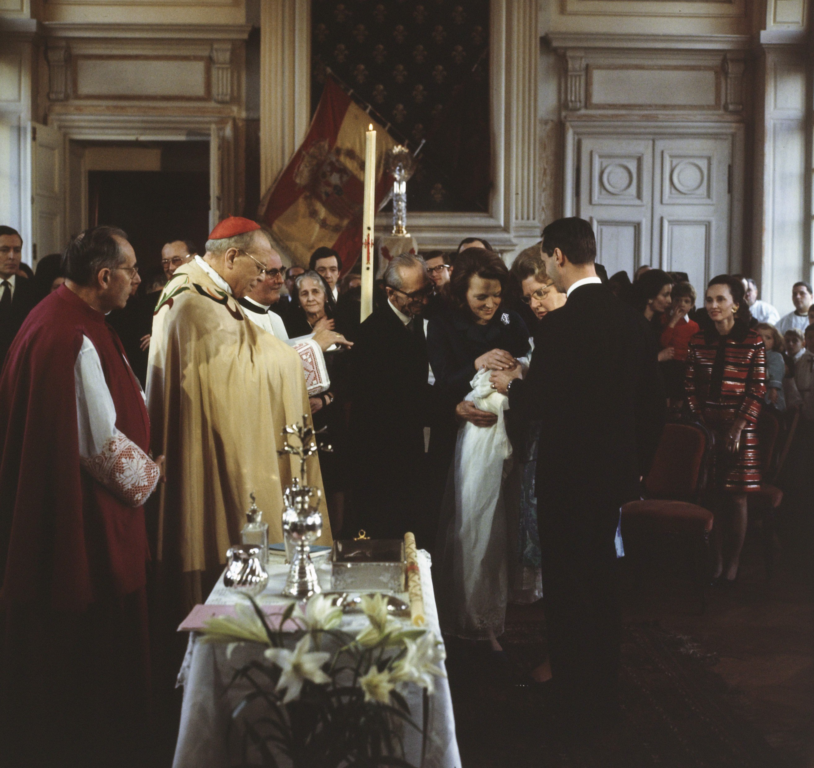 Collectie / Archief : Fotocollectie Anefo Reportage / Serie : [ onbekend ] Beschrijving : Prins Carlos Jr. Bernardo wordt gedoopt in kerk te Lignieres, Frankrijk, door Kardinaal Lefebre Datum : 10 februari 1970 Locatie : Frankrijk Trefwoorden : KERK, dopen, prinsen Persoonsnaam : Carlos, prins, Kardinaal Lefebre Fotograaf : Koch, Eric / Anefo Auteursrechthebbende : Nationaal Archief Materiaalsoort : Dia (kleur) Nummer archiefinventaris : bekijk toegang 2.24.01.07 Bestanddeelnummer : 254-8609